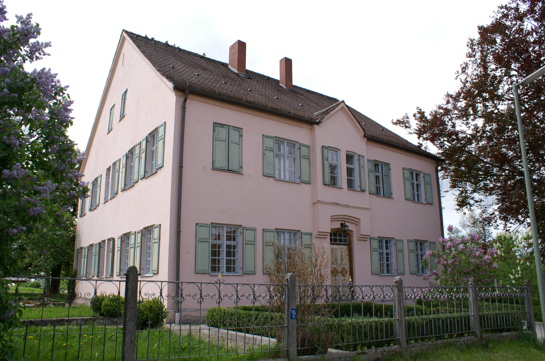 Pfarrhof in Ingenried, Pforzen